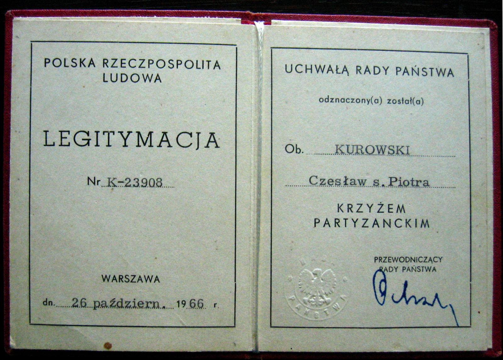 Legitymacja do Krzyża Partyzanckiego, wydana dla Czesława Kurowskiego